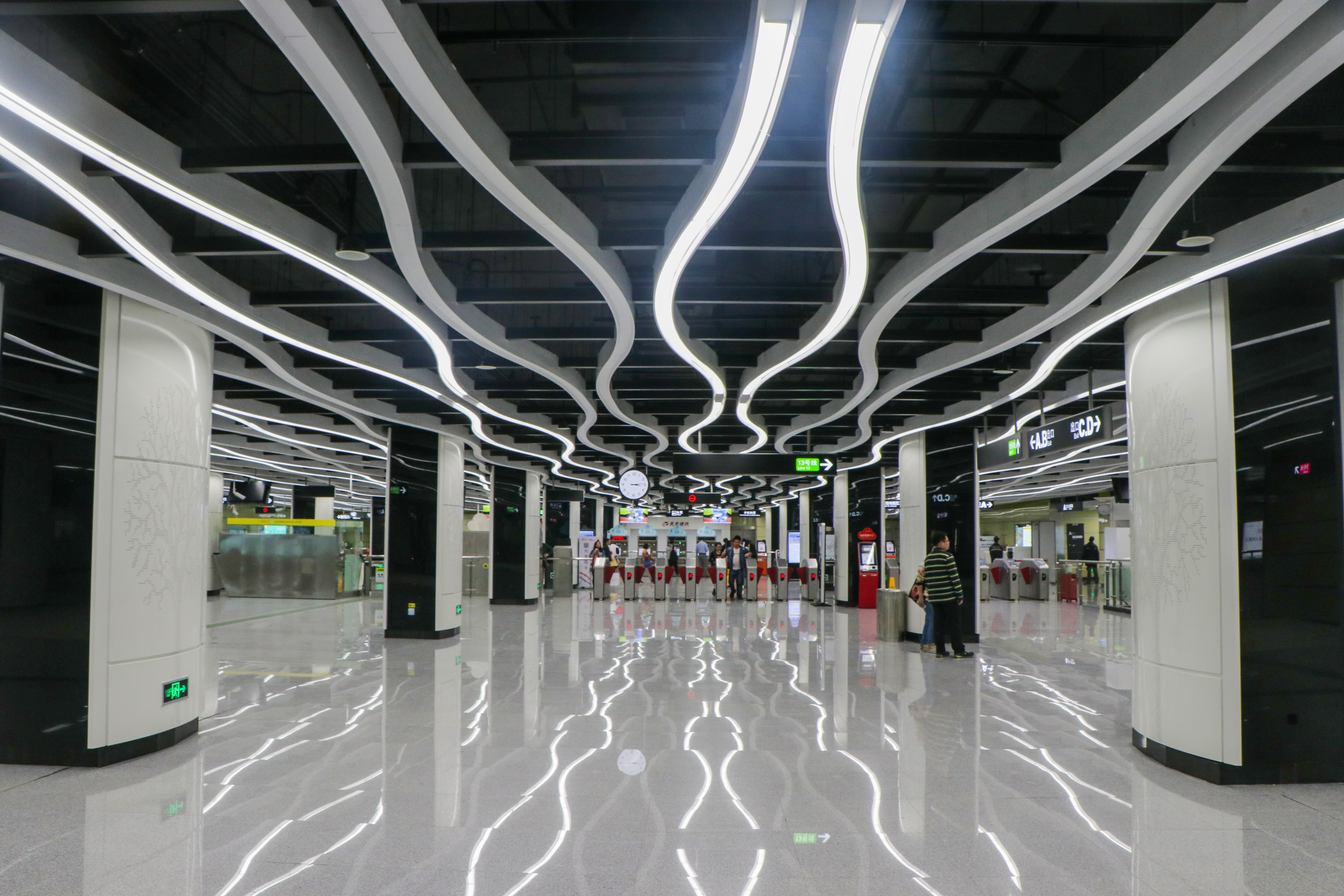 广州地铁鱼珠站